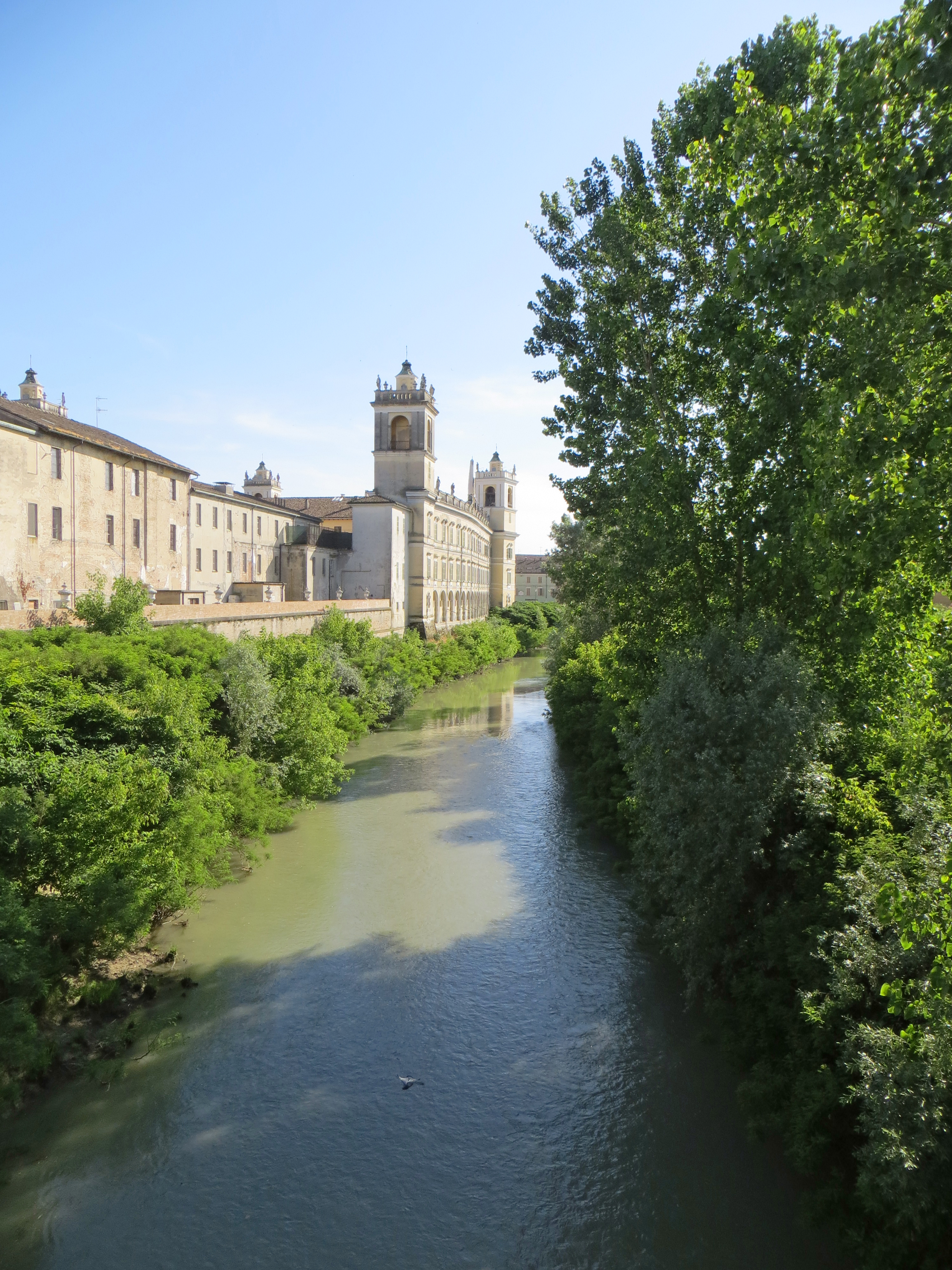 Palazzo Ducale (Colorno) - lato nord-ovest This is a photo of a monument which is part of cultural heritage of Italy.